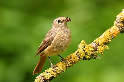 Phoenicurus phoenicurus - female